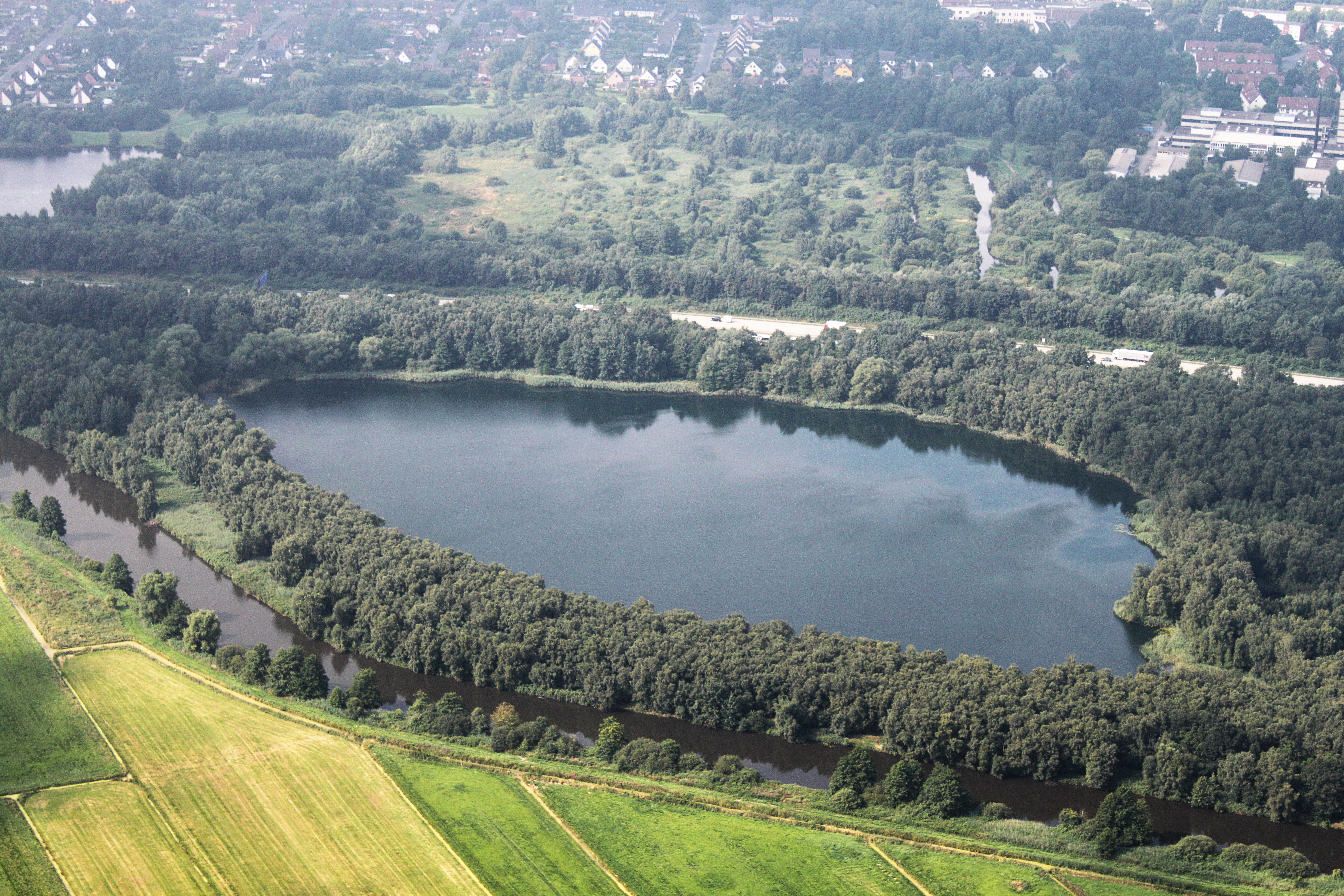 Fotoflug Bremen; Flughöhe 500 m; JVA Oslebshausen bis Abfahr Bremen Nord